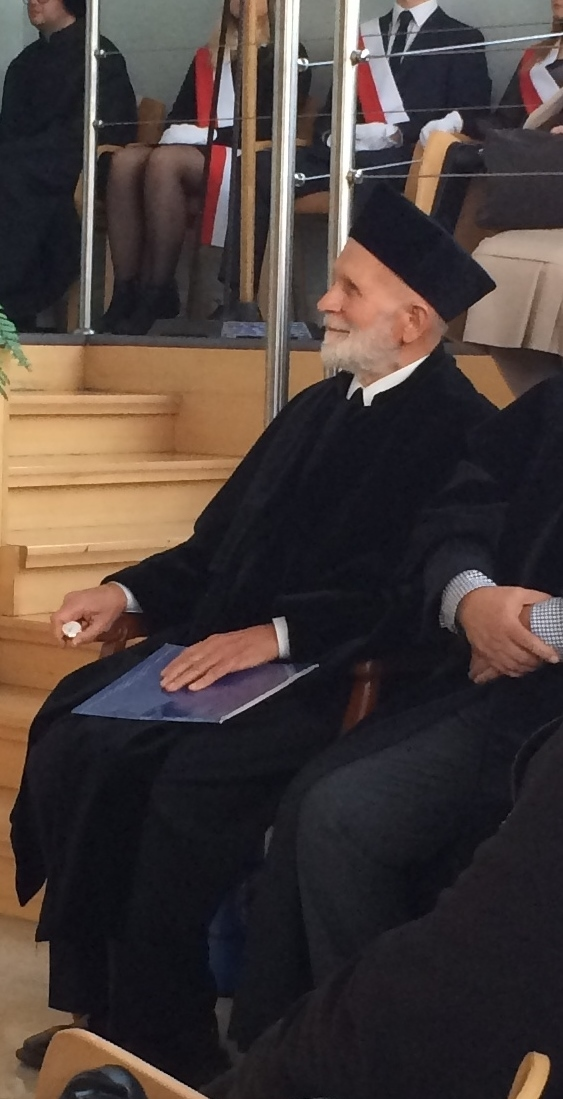 Ks. prof. W. Hryniewicz 30-10-2014